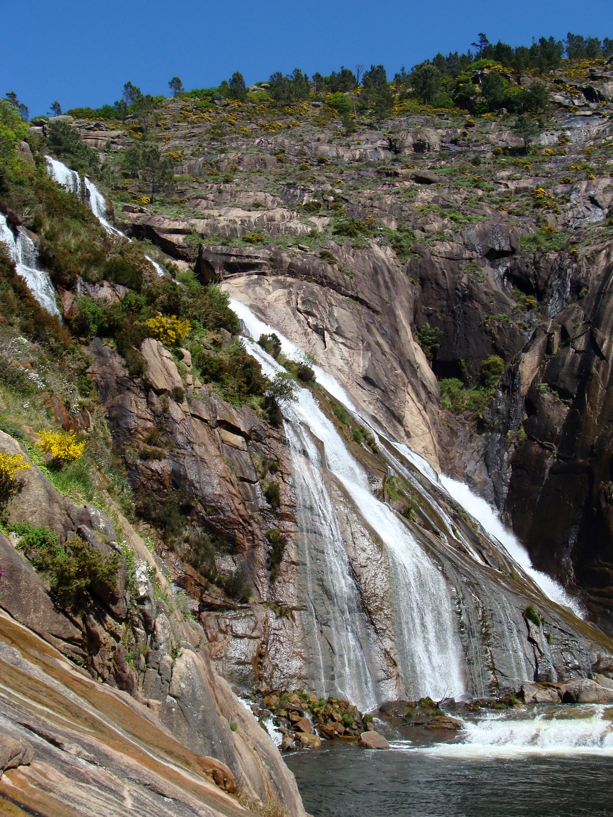 Cascada en la desembocadura del río Xallas. El agua en primer término ya se encuentra al nivel del mar, en la ría.